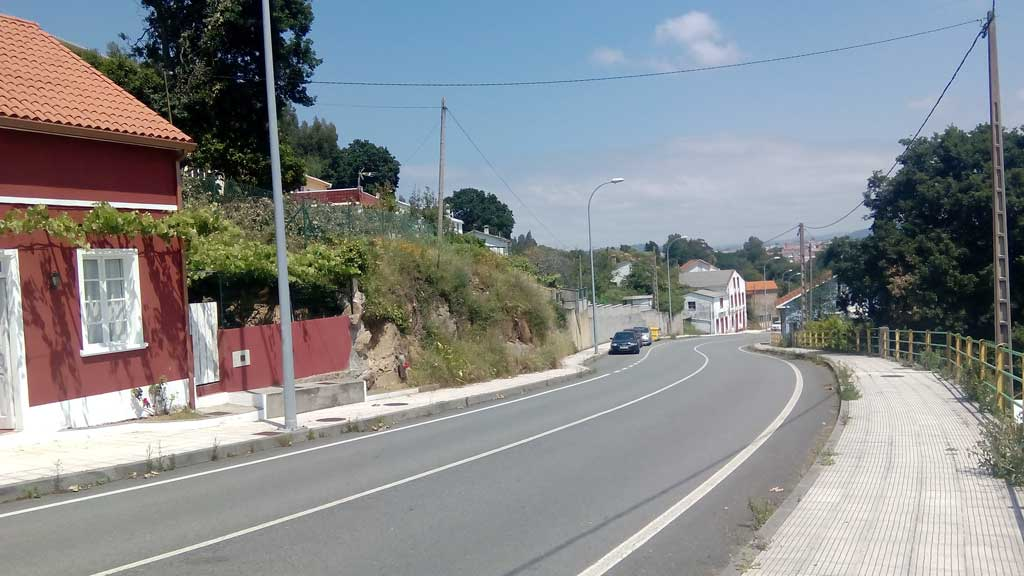 Montecuruto na DP3608.